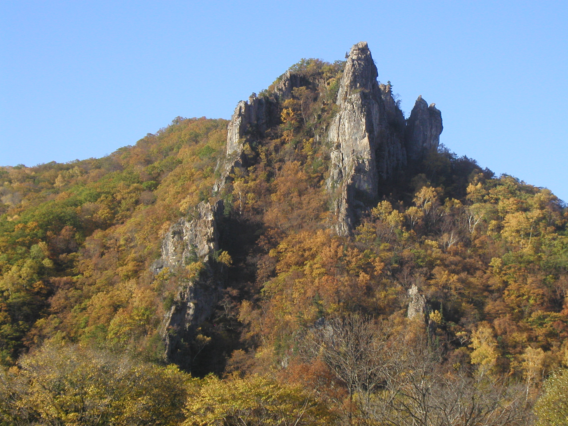 Rock in Sikhote-Alin